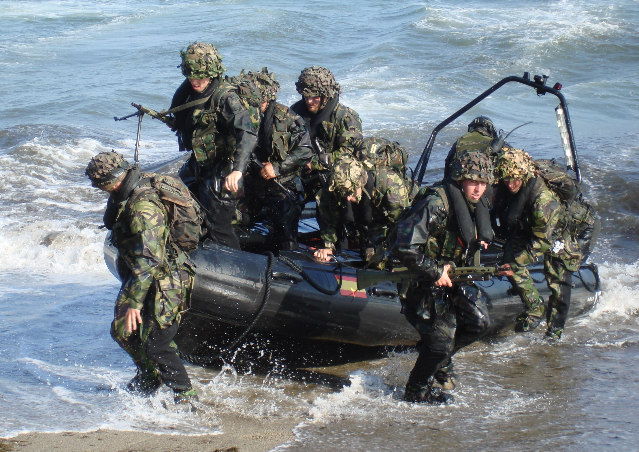 Lancha Semirrígida DUARRY SUPERCAT